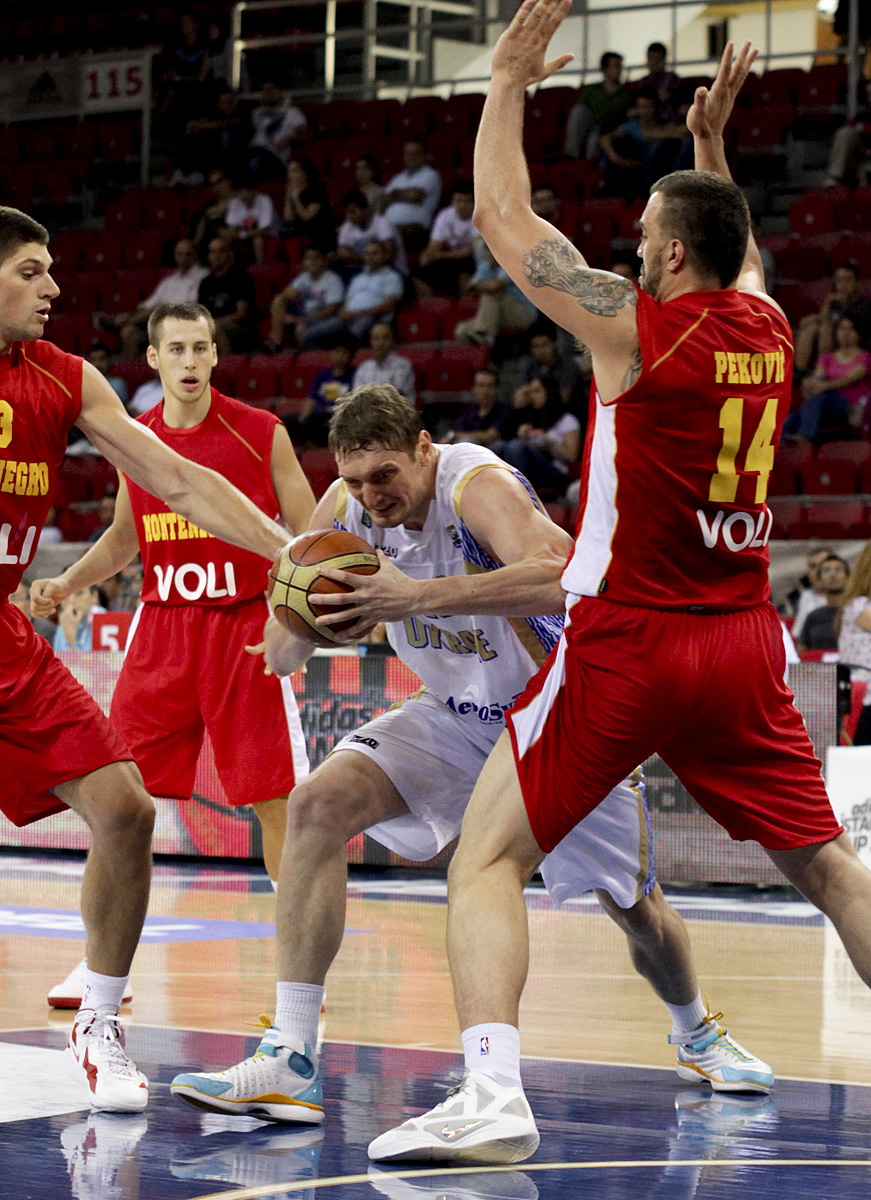 Ukraine vs. Montenegro